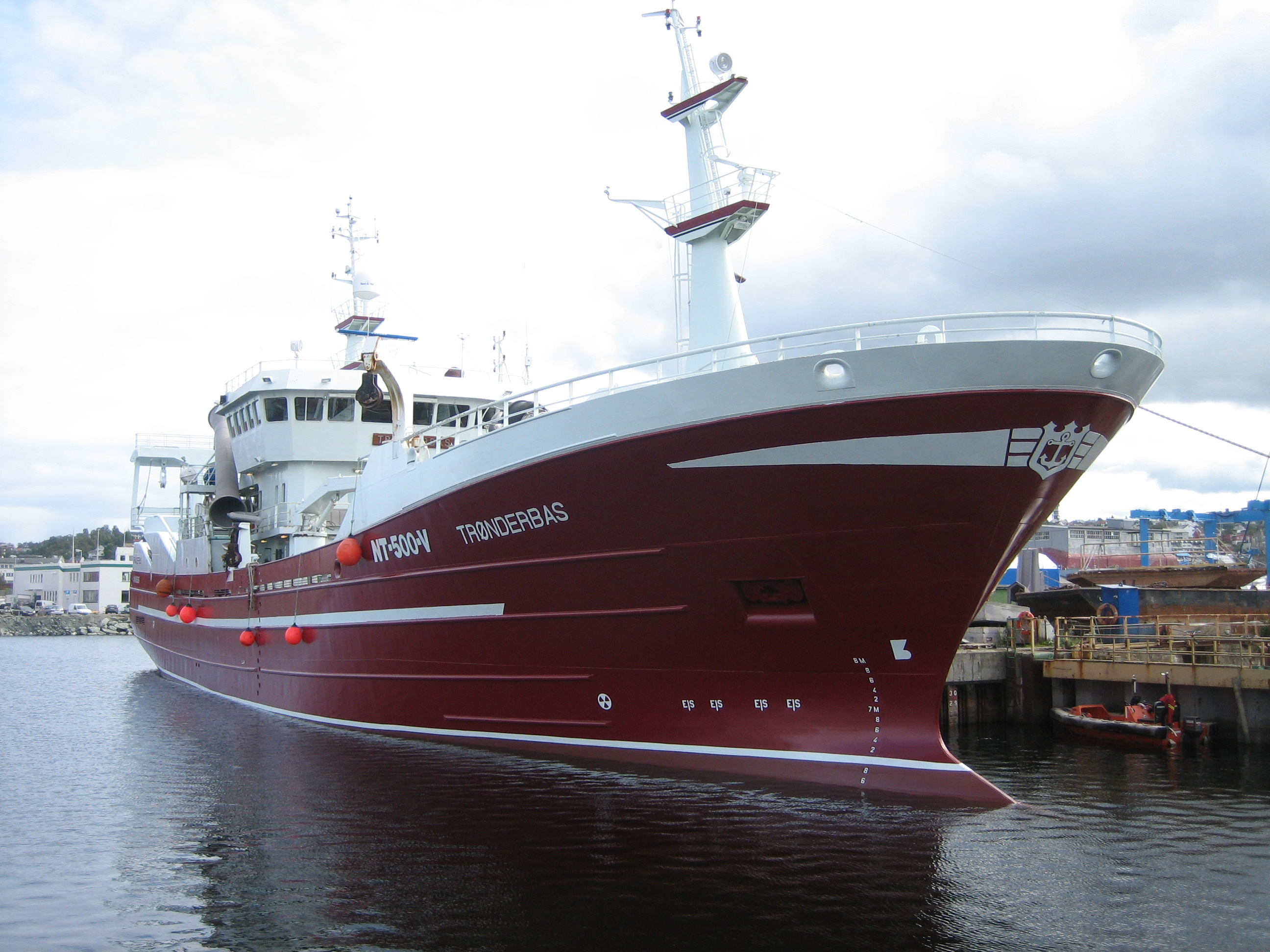 Trønderbas